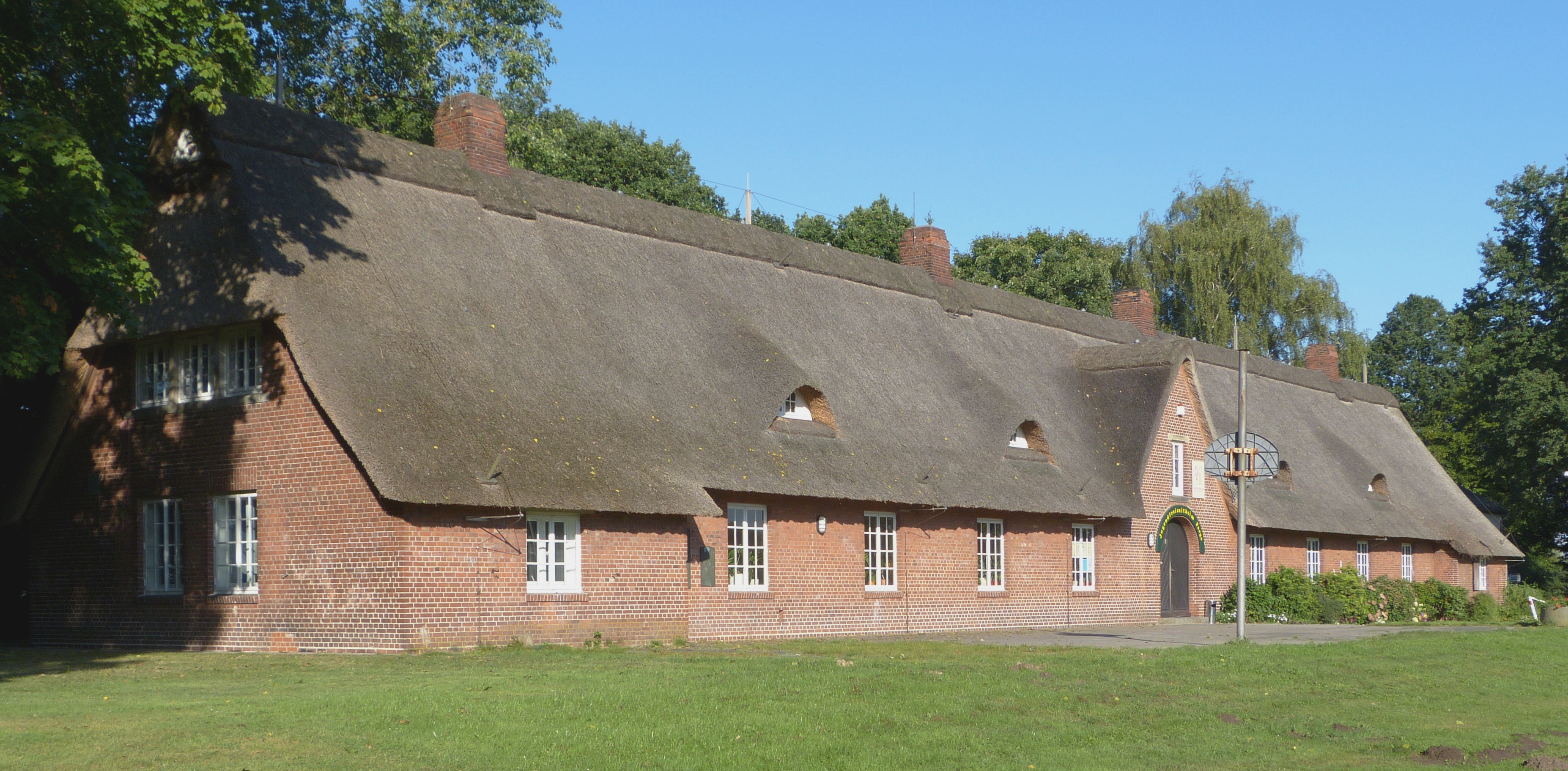 Hitlerjugendheim Farge in Bremen, Rekumer Straße 2Das abgebildete Objekt ist ein geschütztes Kulturdenkmal in der Freien Hansestadt Bremen, mit der Nr. 1307 beim Landesamt für Denkmalpflege registriert.